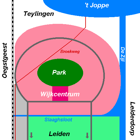 Schematische kaart van de Leidense Merenwijk